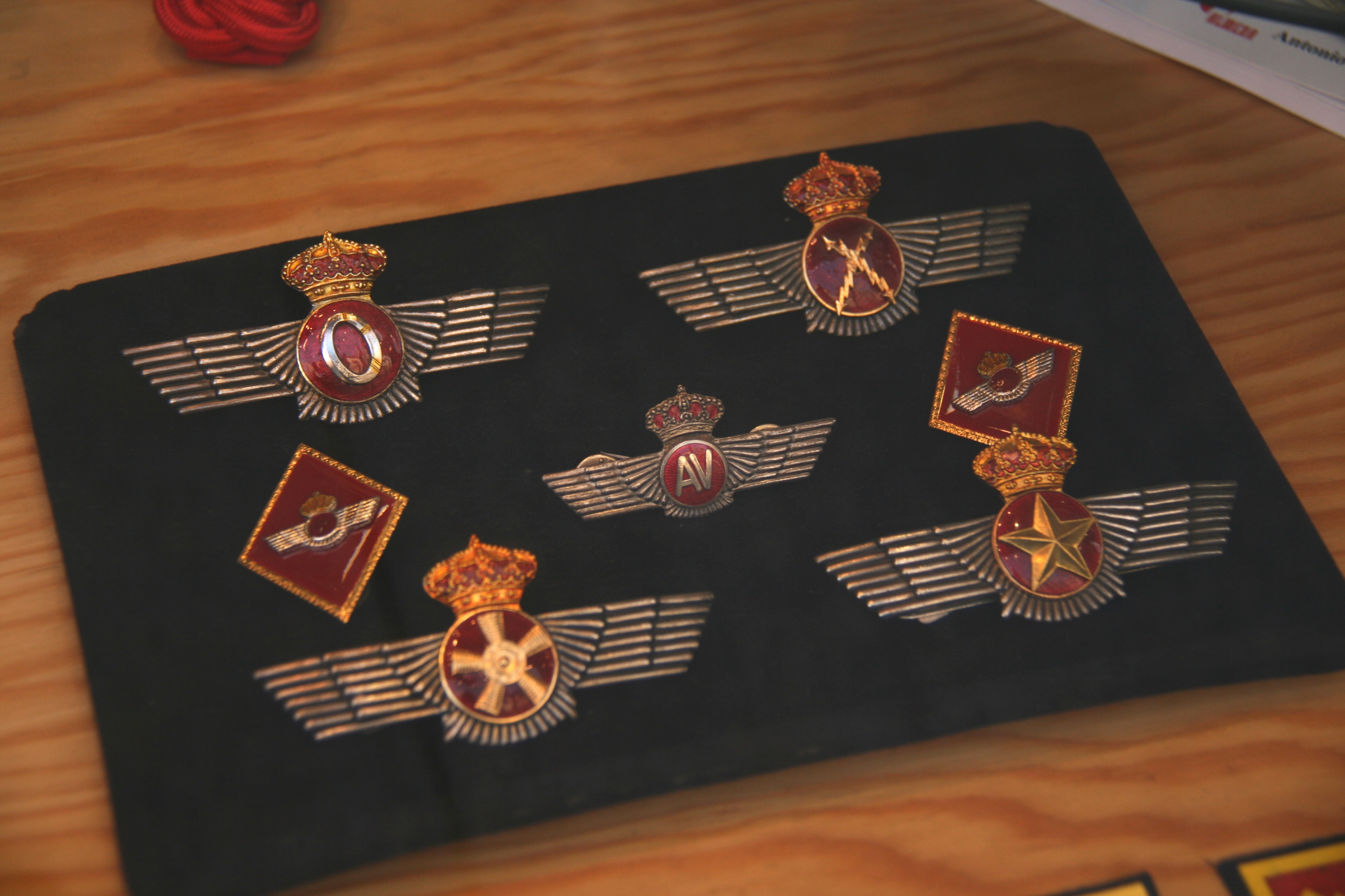 Emblemas del ejército español